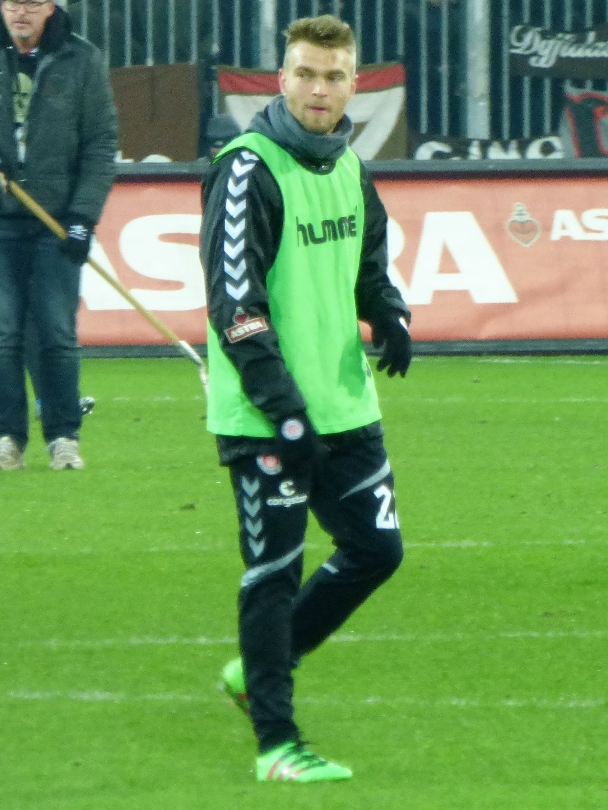 Yannick Deichmann, FC St. Pauli